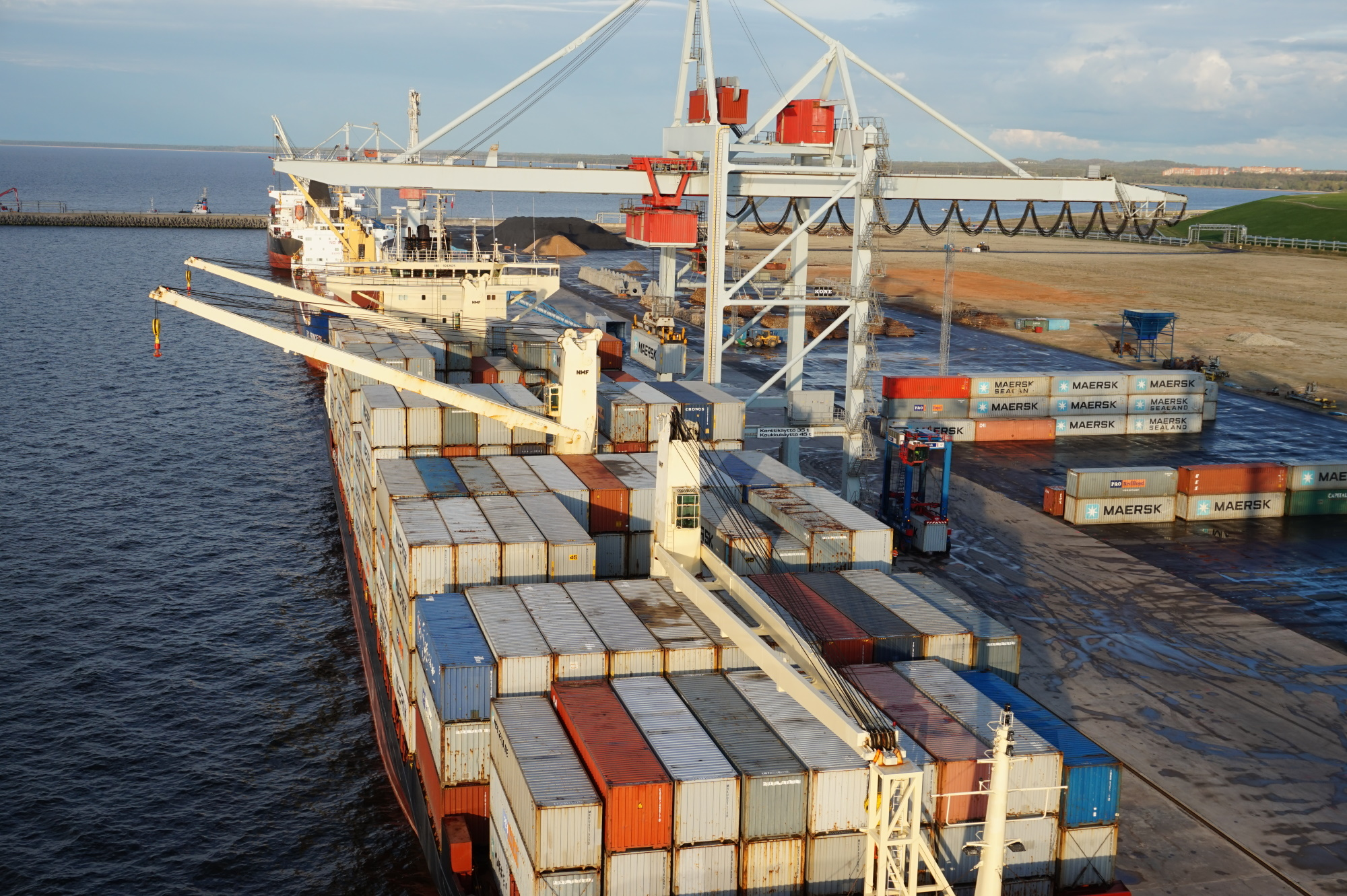 Konteinerite laadimine.